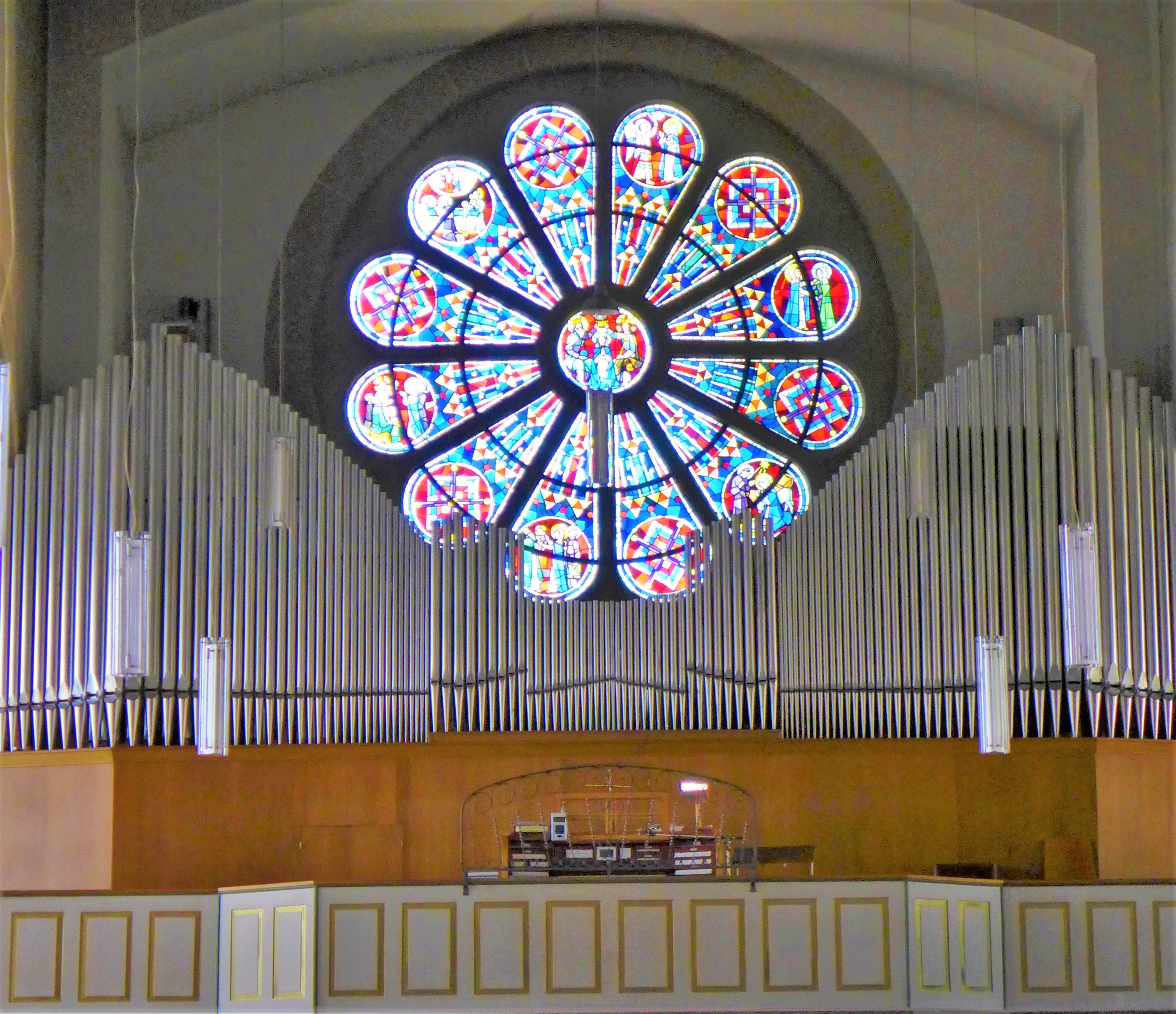 Maria Himmelfahrt (Roden), Orgelempore mit Rosenfenster